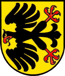 Wappen der politischen Gemeinde Eptingen, Schweiz